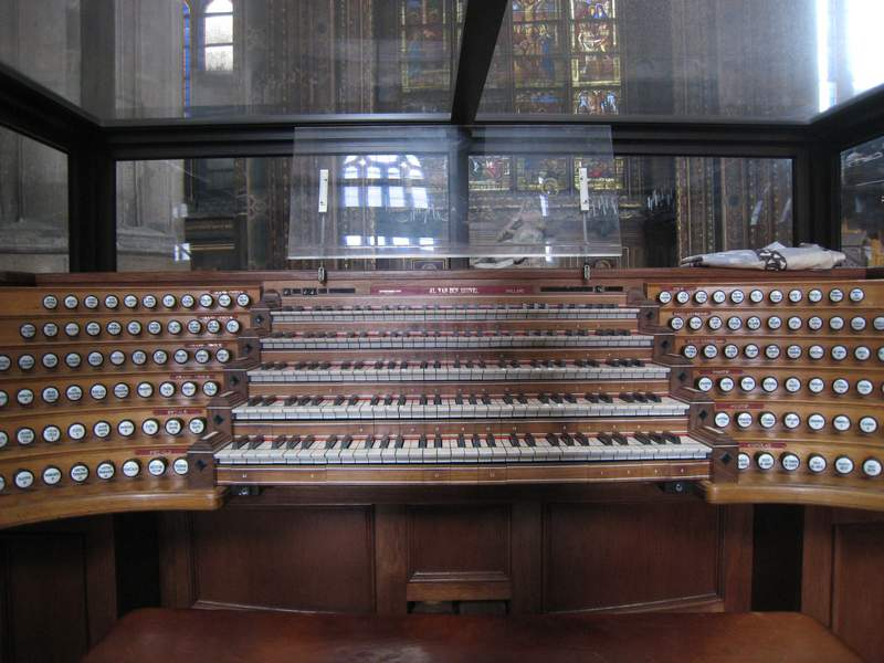 Spieltisch der Orgel in der St. Eustach, Paris.